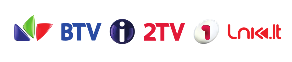 LNK TV grupė